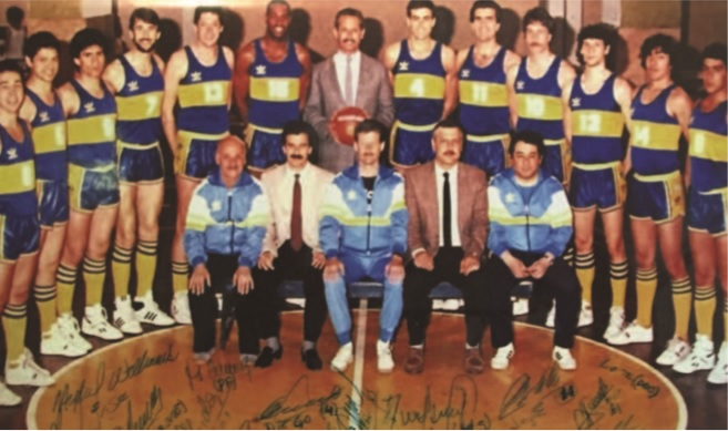 De izq. a der: HEREDIA, CERISOLA, FALICO, RATTONE, BEIGIER, WILLIAMS, SGUÍ (DT), SIMONE, LAVORATTO, MEIRE, SACHI, MALERBA y CENTENO.